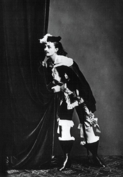 Helena Modrzejewska (1840-1909) w sztuce "Dwór królewicza Władysława", w kostiumie jako Adam Kazanowski